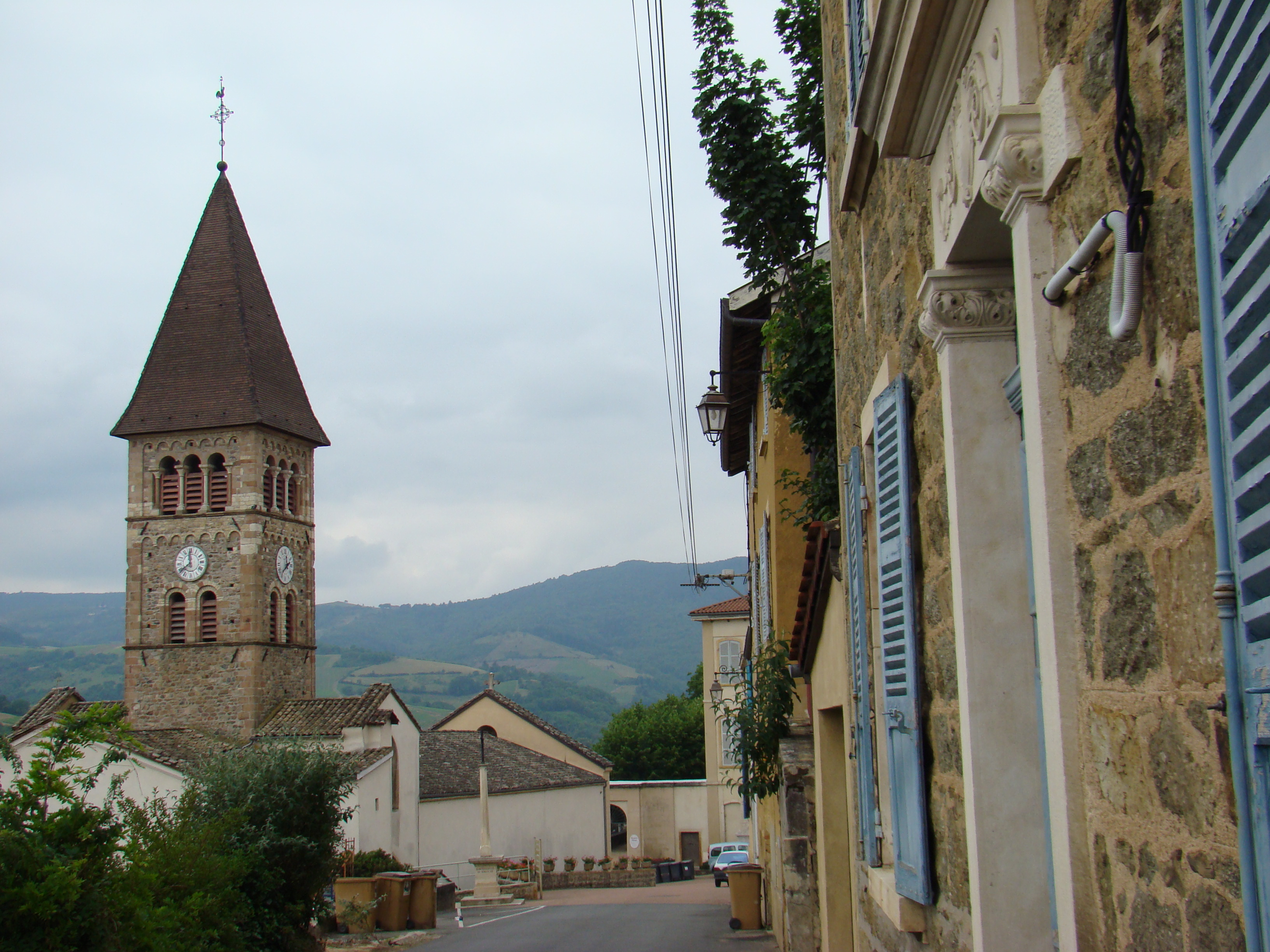 Rue et église de Vaux en Beaujolais